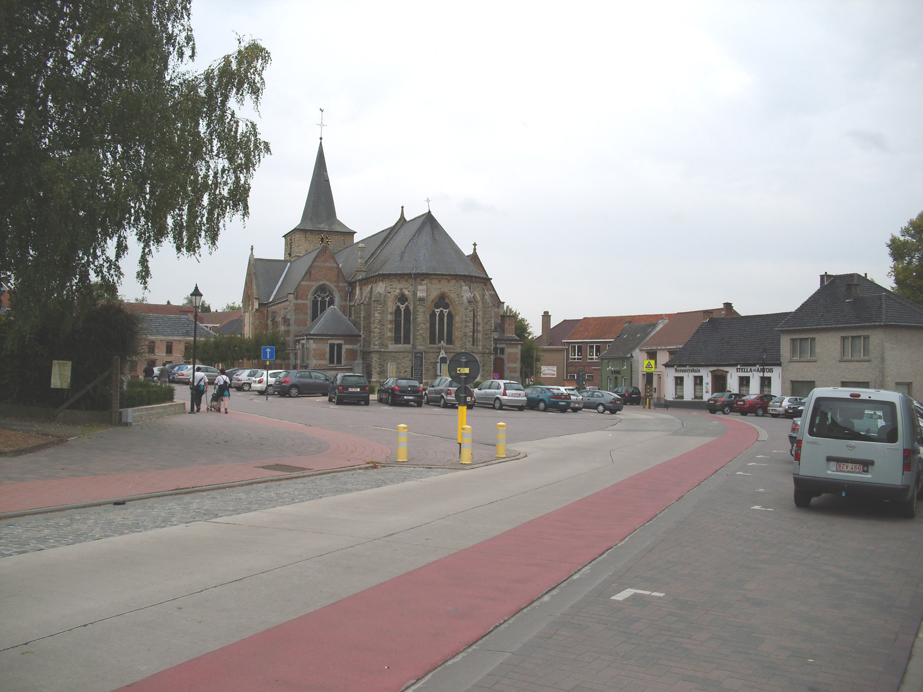 Dorp van Deftinge - deelgemeente van Lierde - Oost-Vlaanderen - Vlaanderen - België